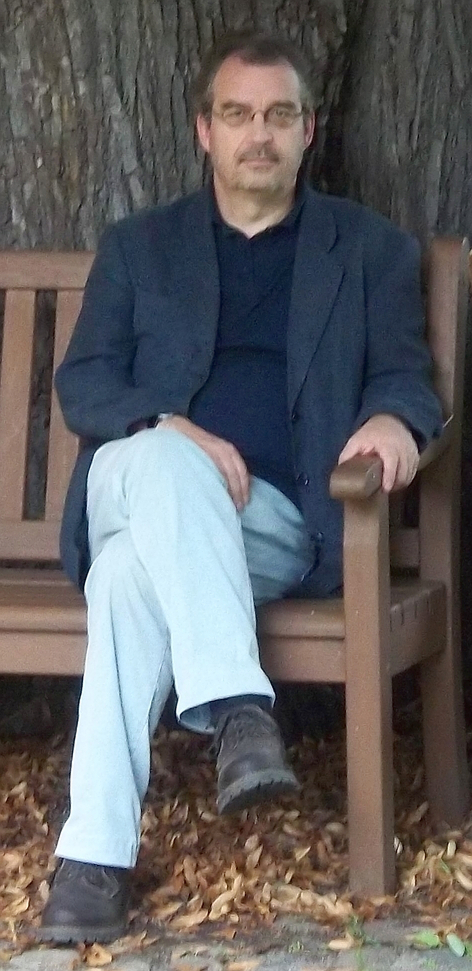 Frederik David Tunnat auf der Tagung des Freundeskreises Karl Vollmoeller in Niden Litauen